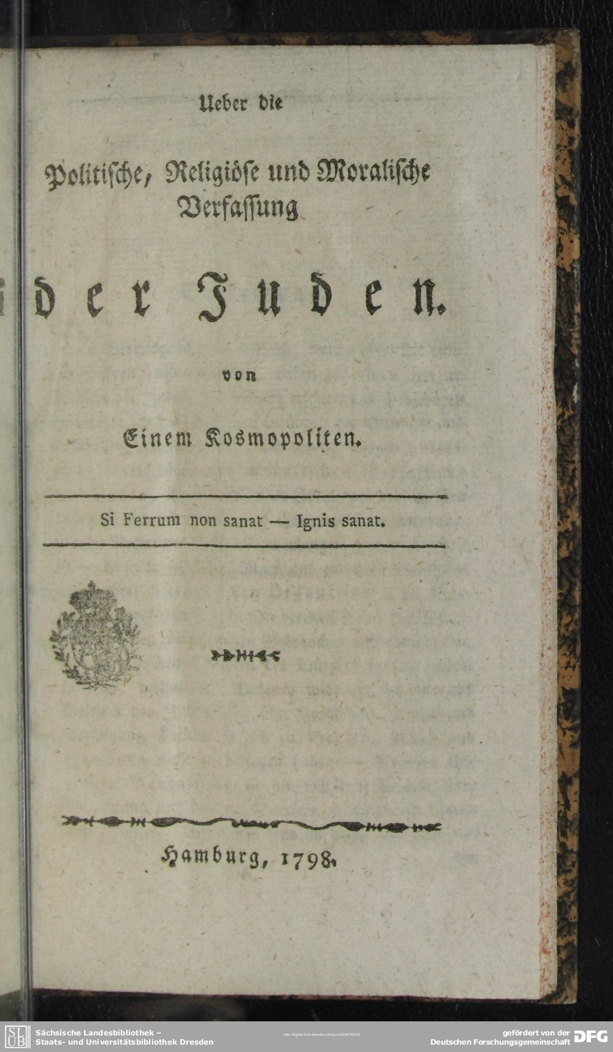 Von einem Kosmopoliten (Julius Friedrich Knüppeln): Ueber die Politische, Religiöse und Moralische Verfassung der Juden. Hamburg, 1798